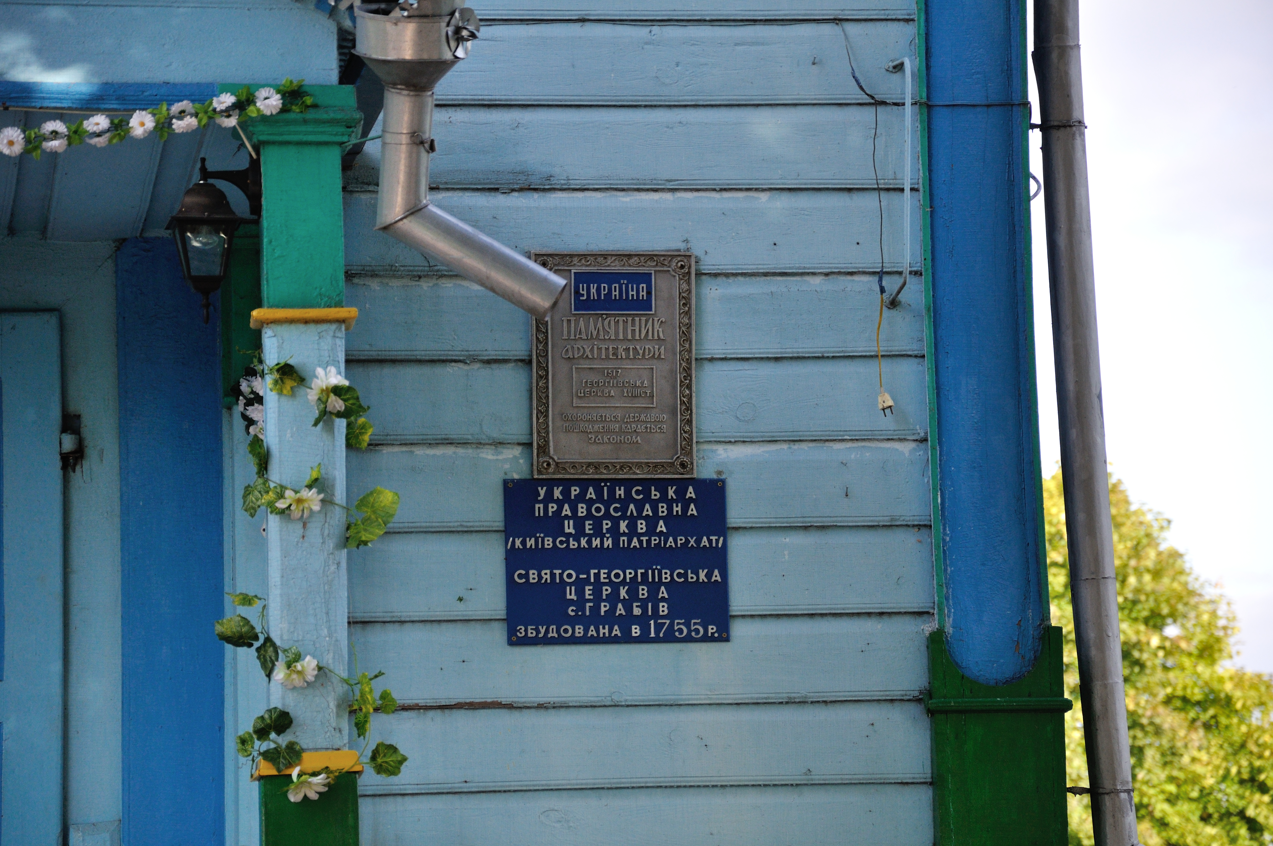 Церква Св.Юрія (дер.), с.Грабів